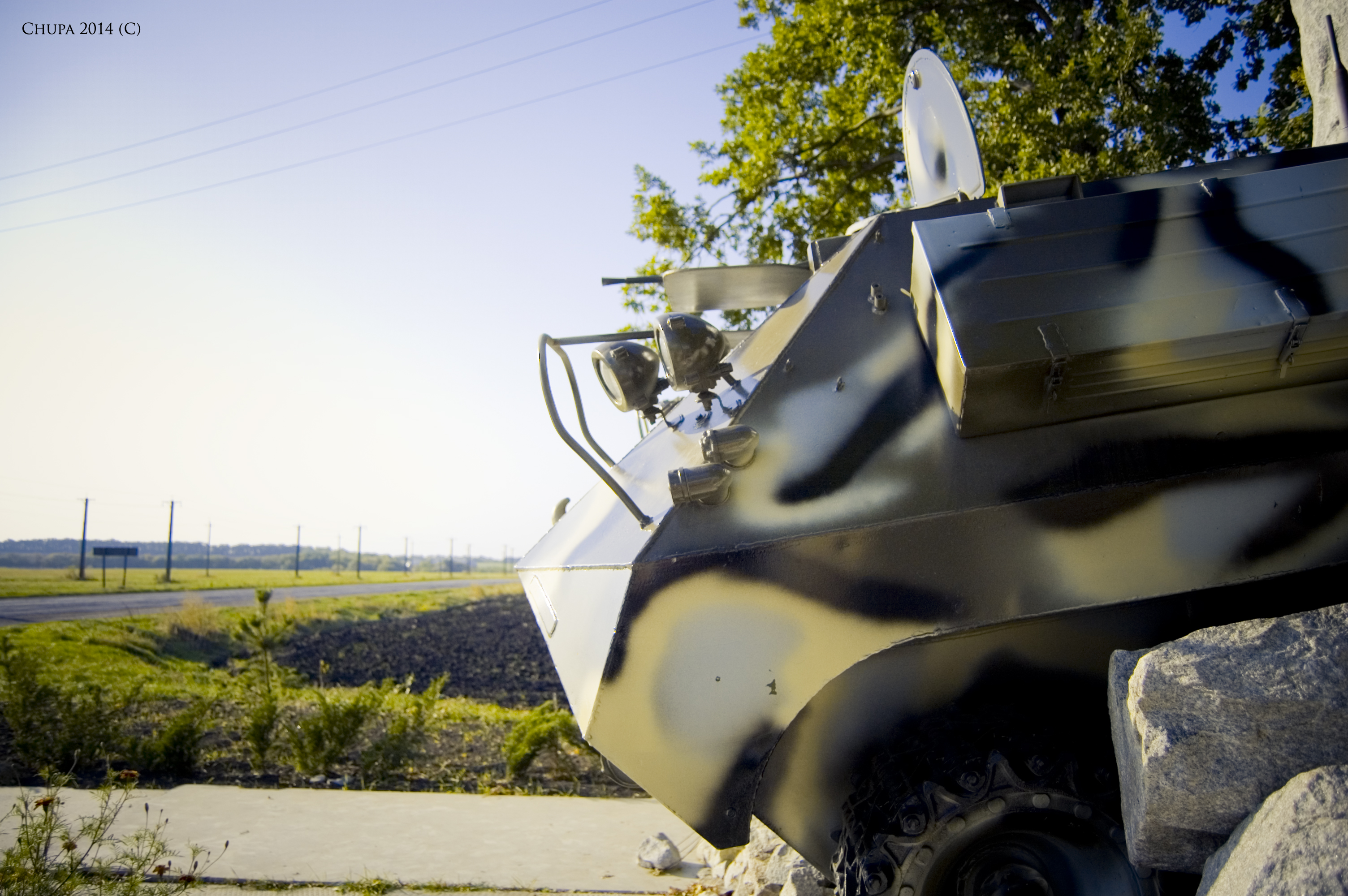 Пам’ятний знак воїнам Інтернаціоналістам, Первомайський, 3 м/р, вул. Кондрат’єва, ріг вул. Гречка